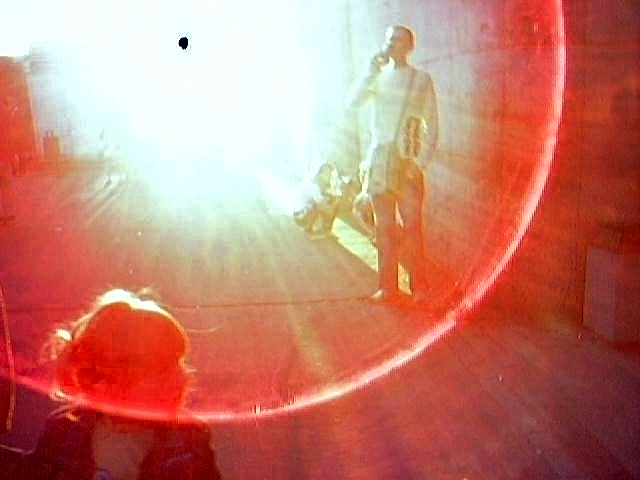 Мобилография Из Арт-проекта "Мобилография" (фотография сделанная мобильным телефоном motorola c650)